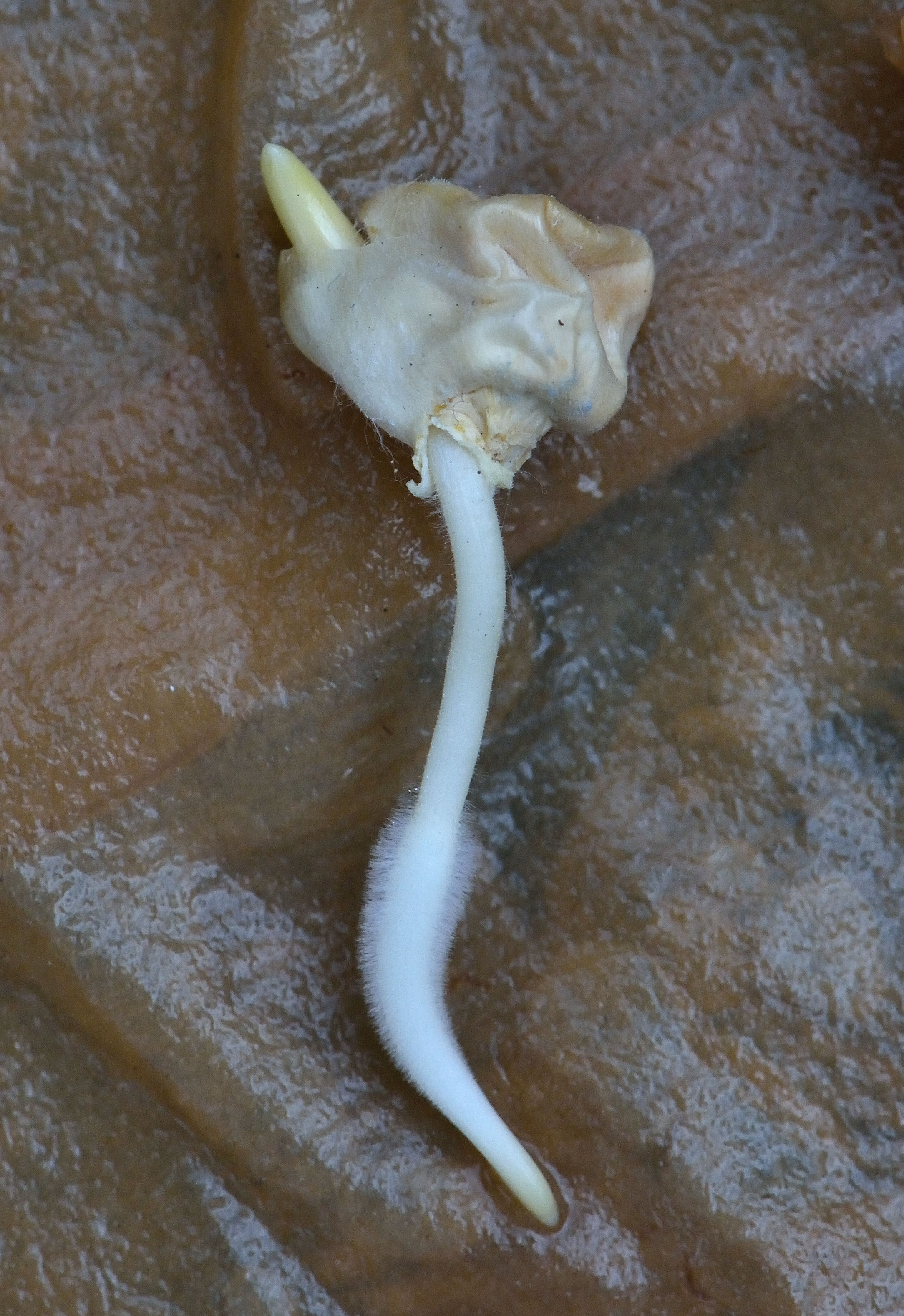 Zea mays (suikermais 'Tasty Sweet') coleorhiza en coleoptyl